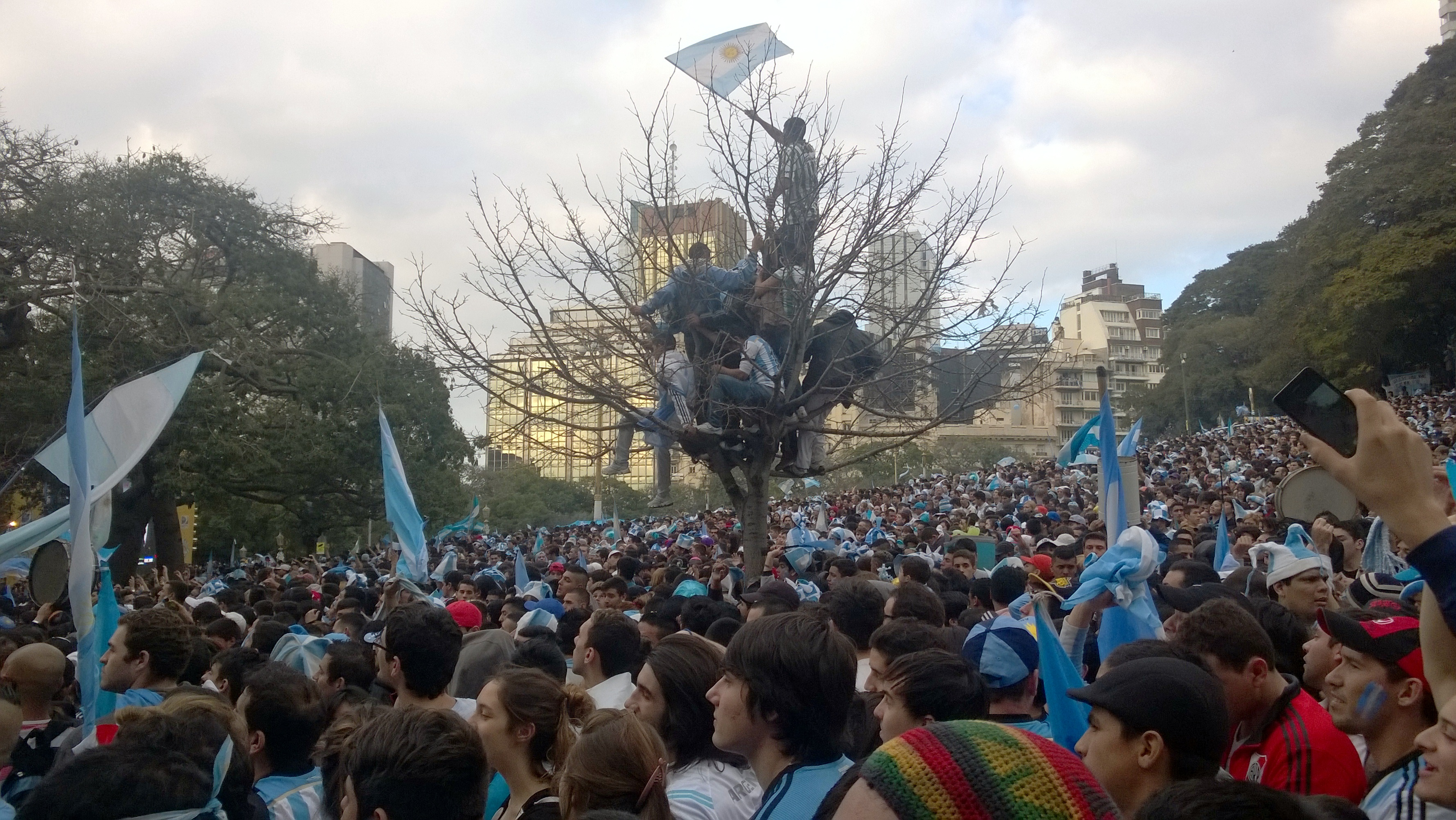 Miles de fanáticos argentinos viendo la final del Mundial de Fútbol en pantalla gigante, en la Plaza San Martín de la Ciudad de Buenos Aires.